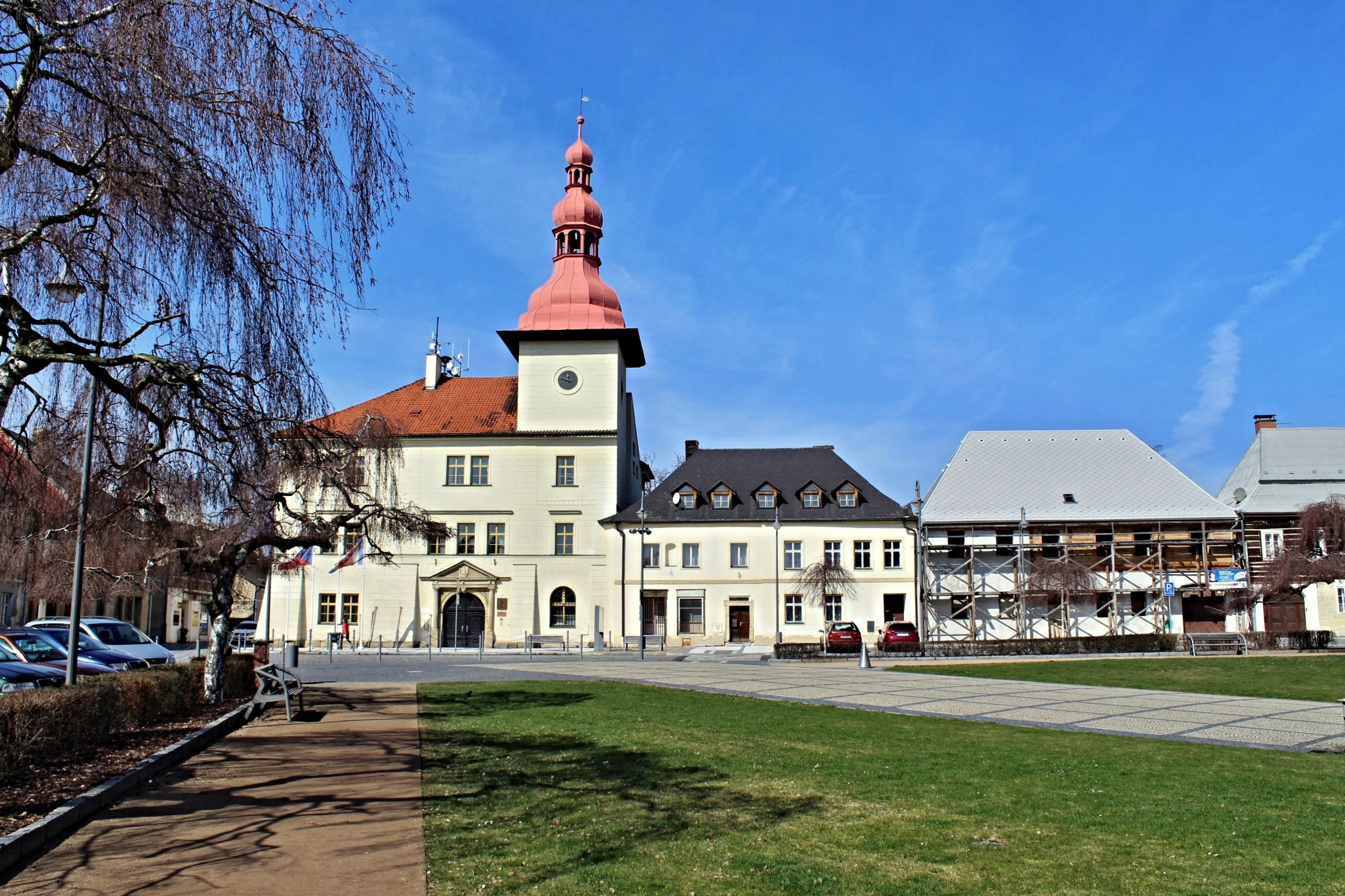 Masarykovo náměstí (Bělá pod Bezdězem)